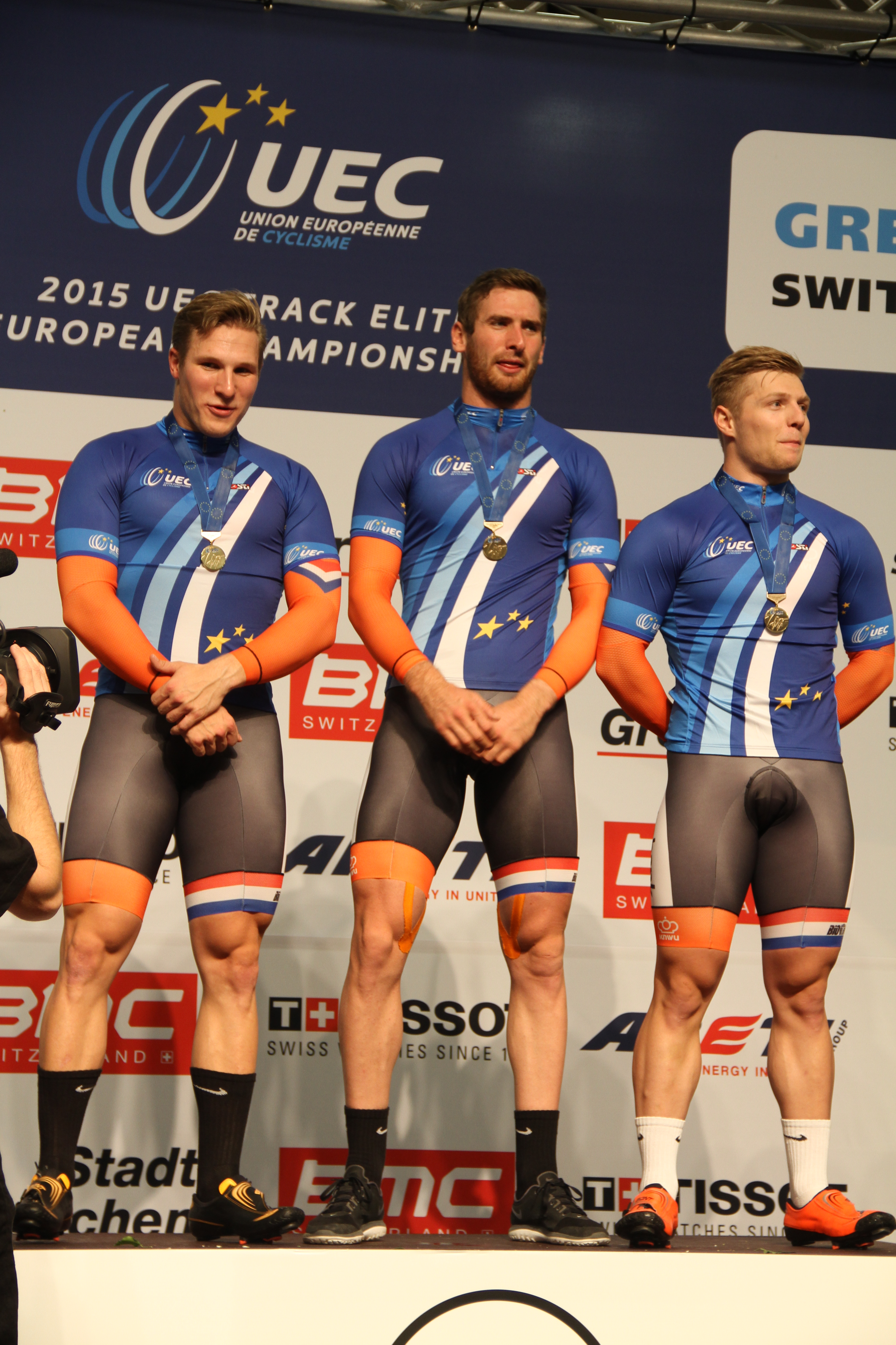 Europameister im Teamsprint (v.l.n.r.): Jeffrey Hoogland, Hugo Haak, Nils van 't Hoenderdaal The making of this document was supported by the Community-Budget of Wikimedia Germany.